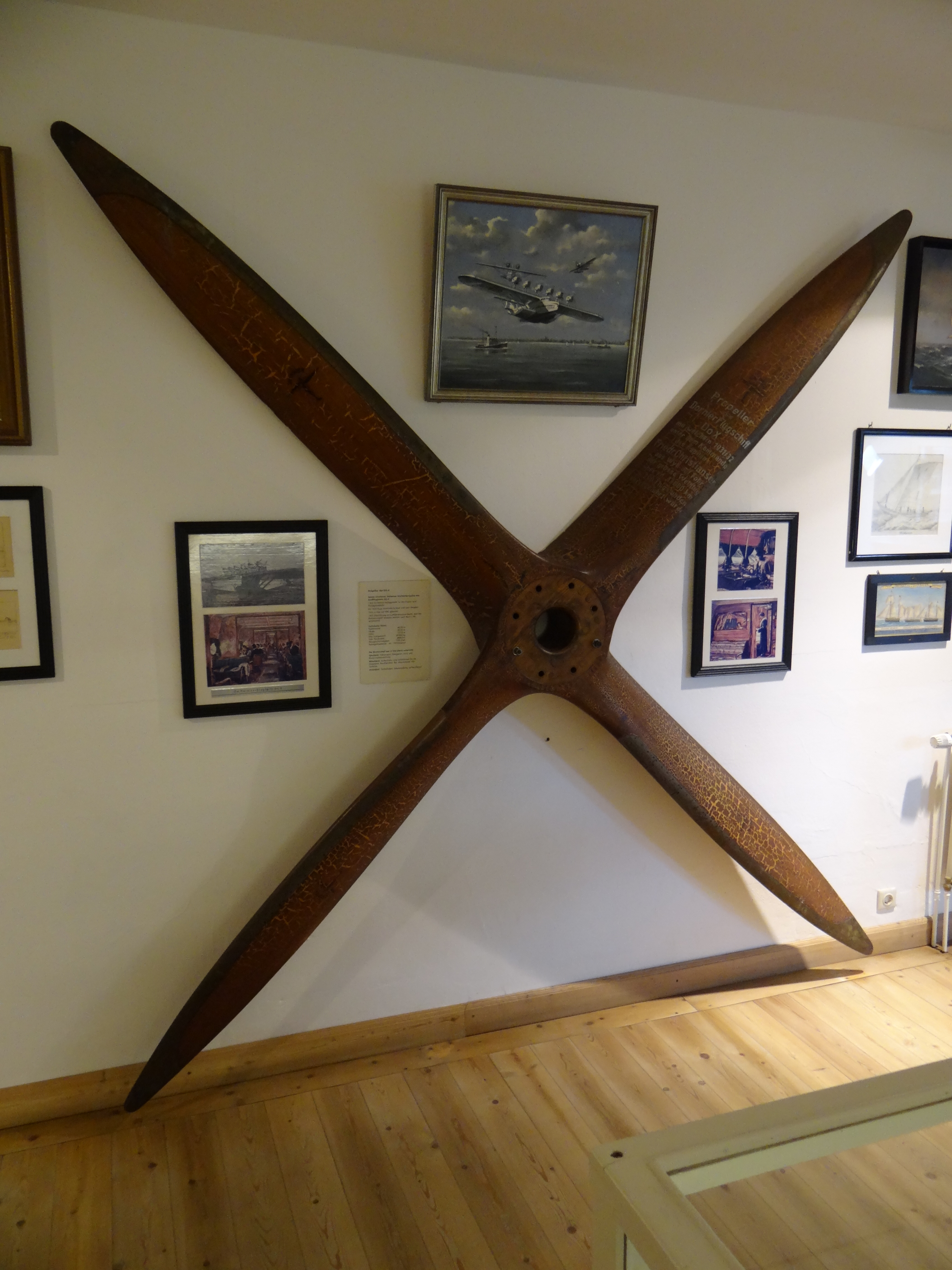 Original-Propeller der DO-X im Friesenmuseum in Wyk auf Föhr.